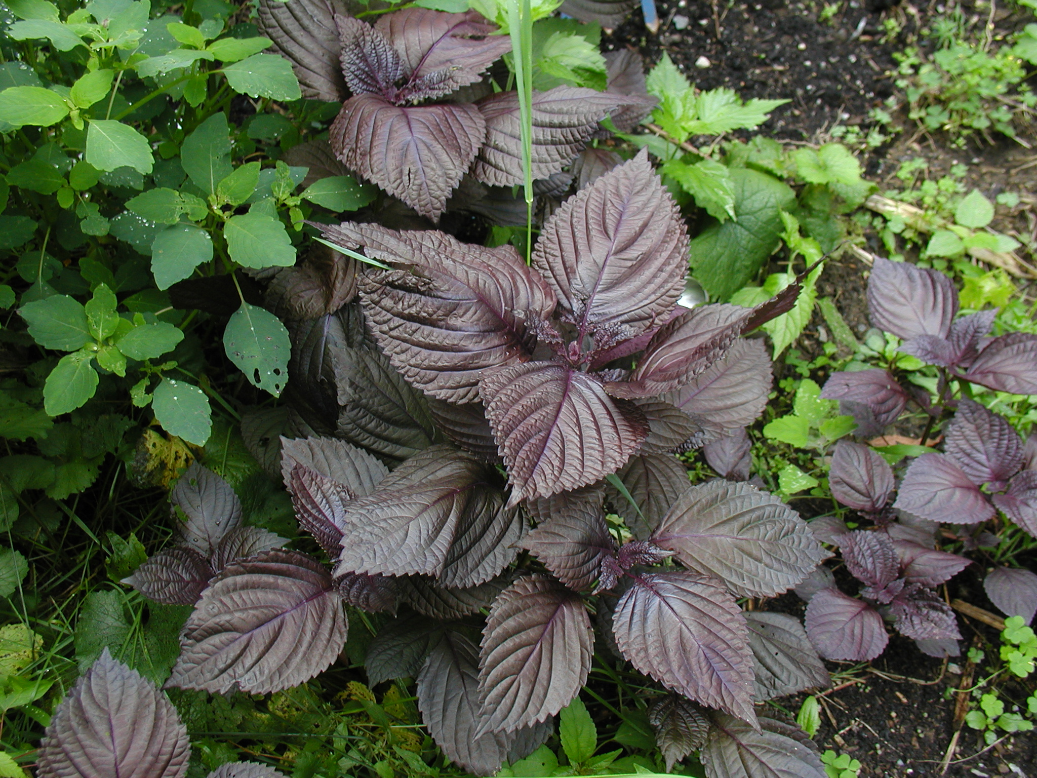 Purple Perilla fructuscens, foliage